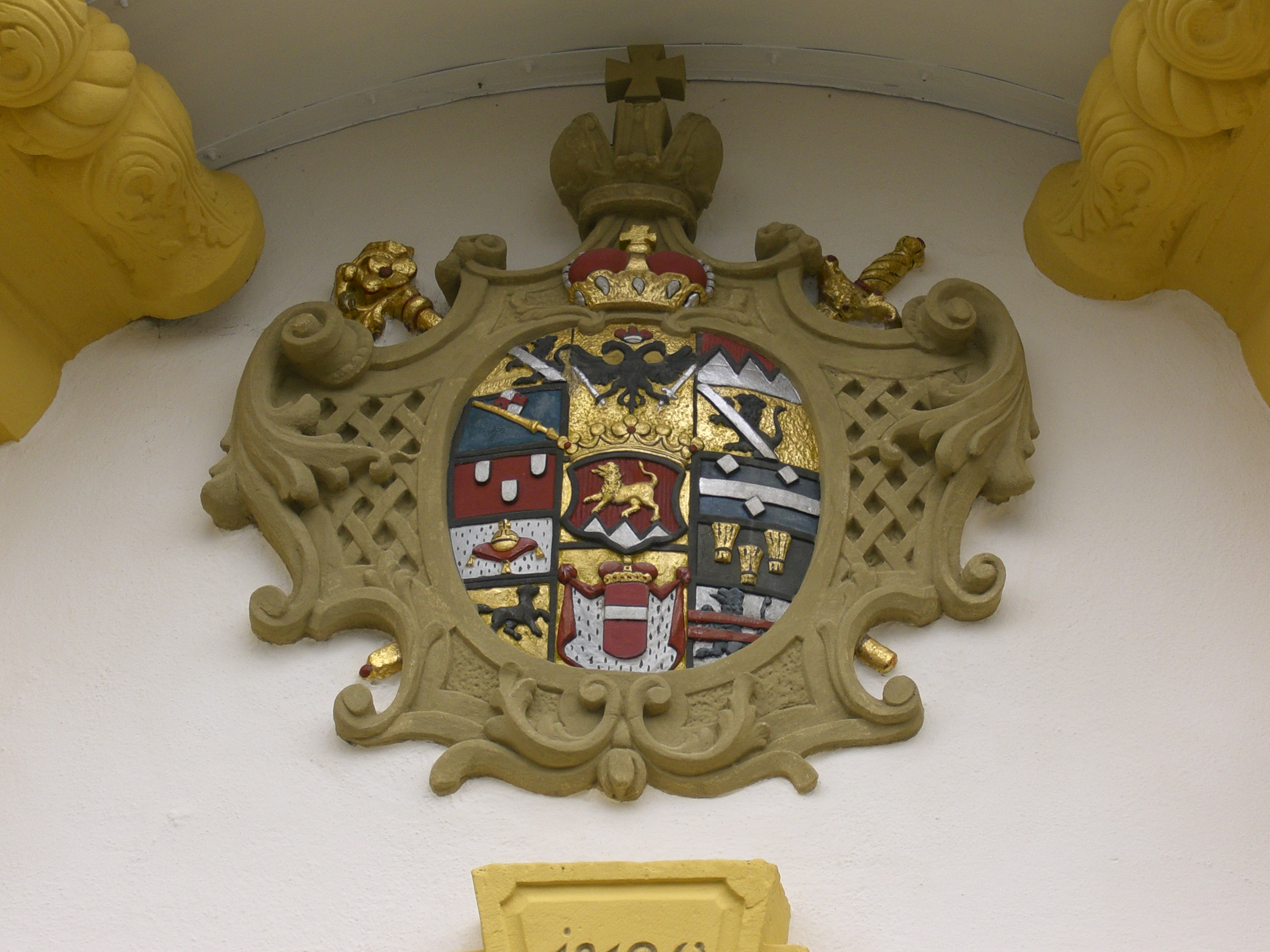 Wappen am Haupteingang der Kirche von Schwemmelsbach